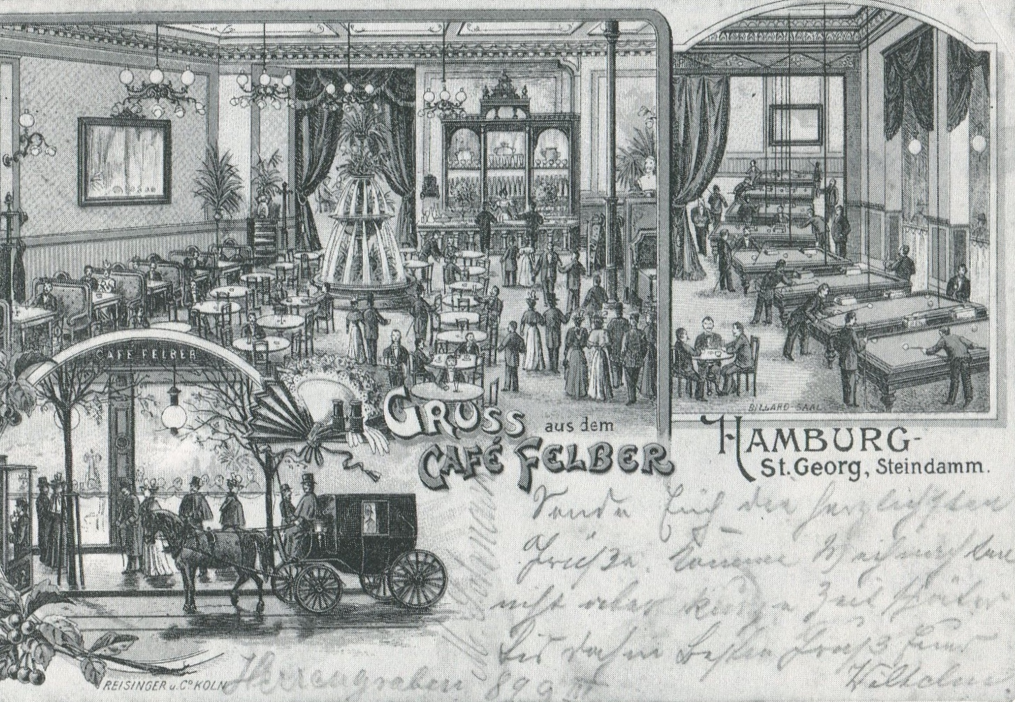 Café Felber Hamburg Steindamm, Gründungslokal des Hamburgischen Künstlerclubs von 1867